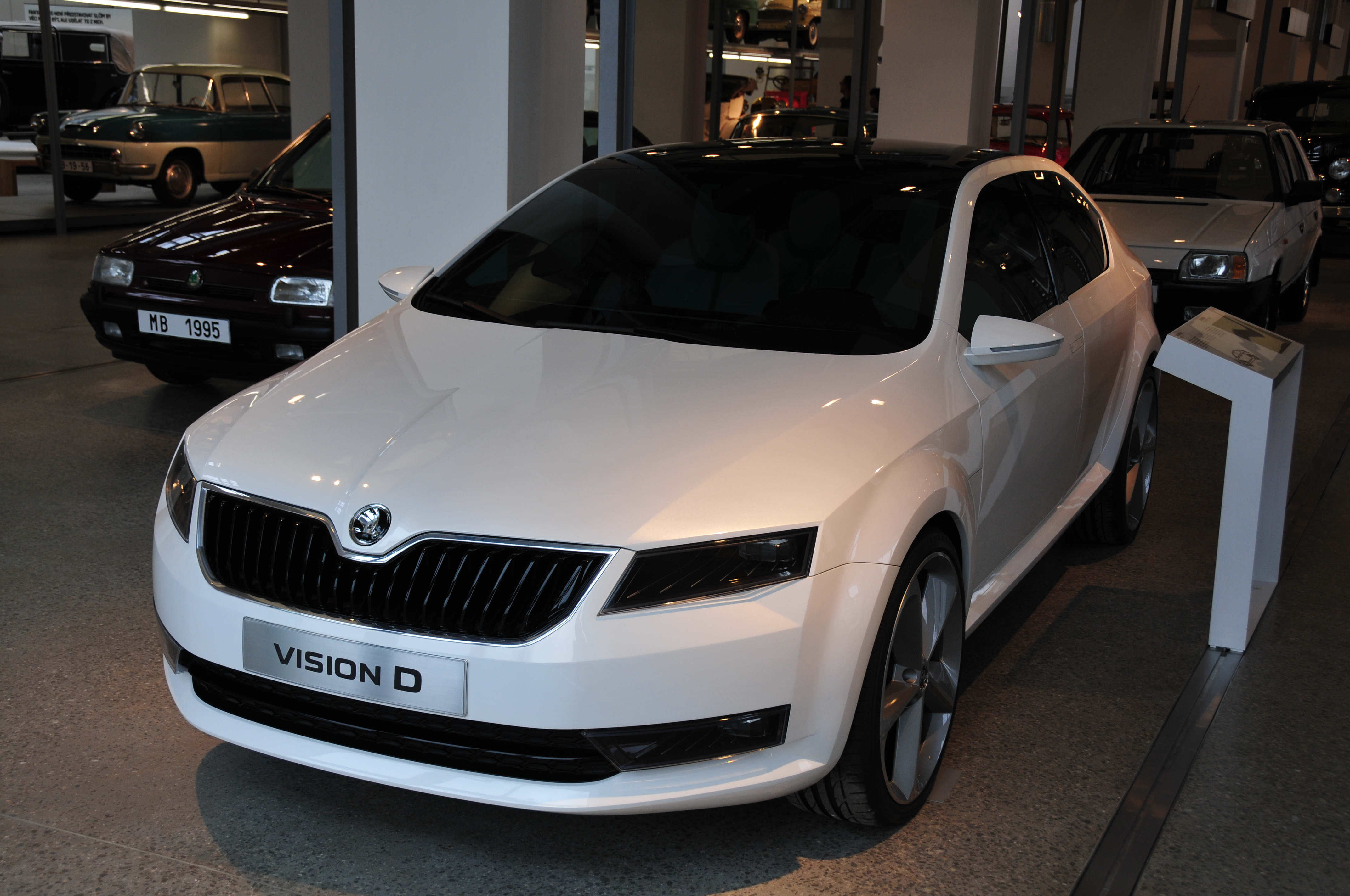 Fototermin Škoda Museum Mladá Boleslav 2013 Fototermin Škoda Muzeum 5. April 2013 in Mladá Boleslav This work is free and may be used by anyone for any purpose. If you wish to use this content, you do not need to request permission as long as you follow any licensing requirements mentioned on this page.